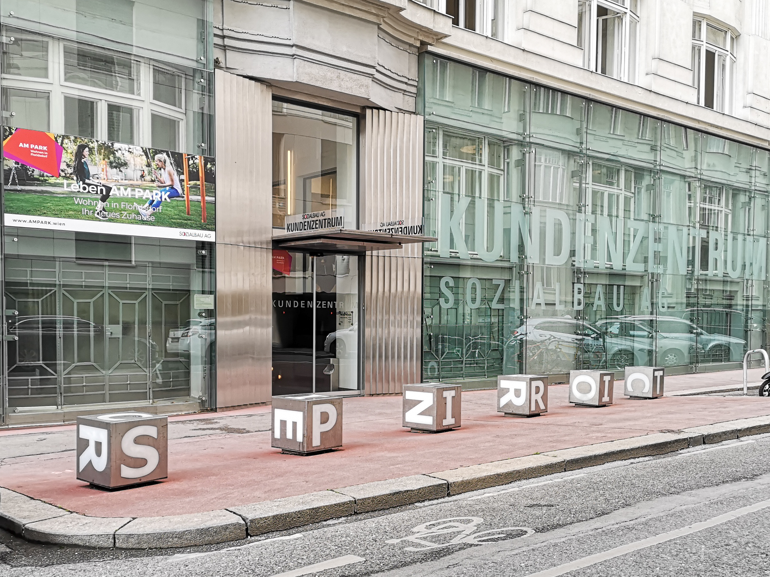 Wien, Sozialbau AG, Lindengasse 55